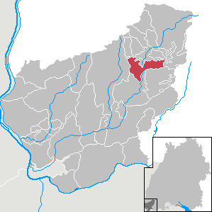 Fröhnd, Landkreis Lörrach, Baden-Württemberg